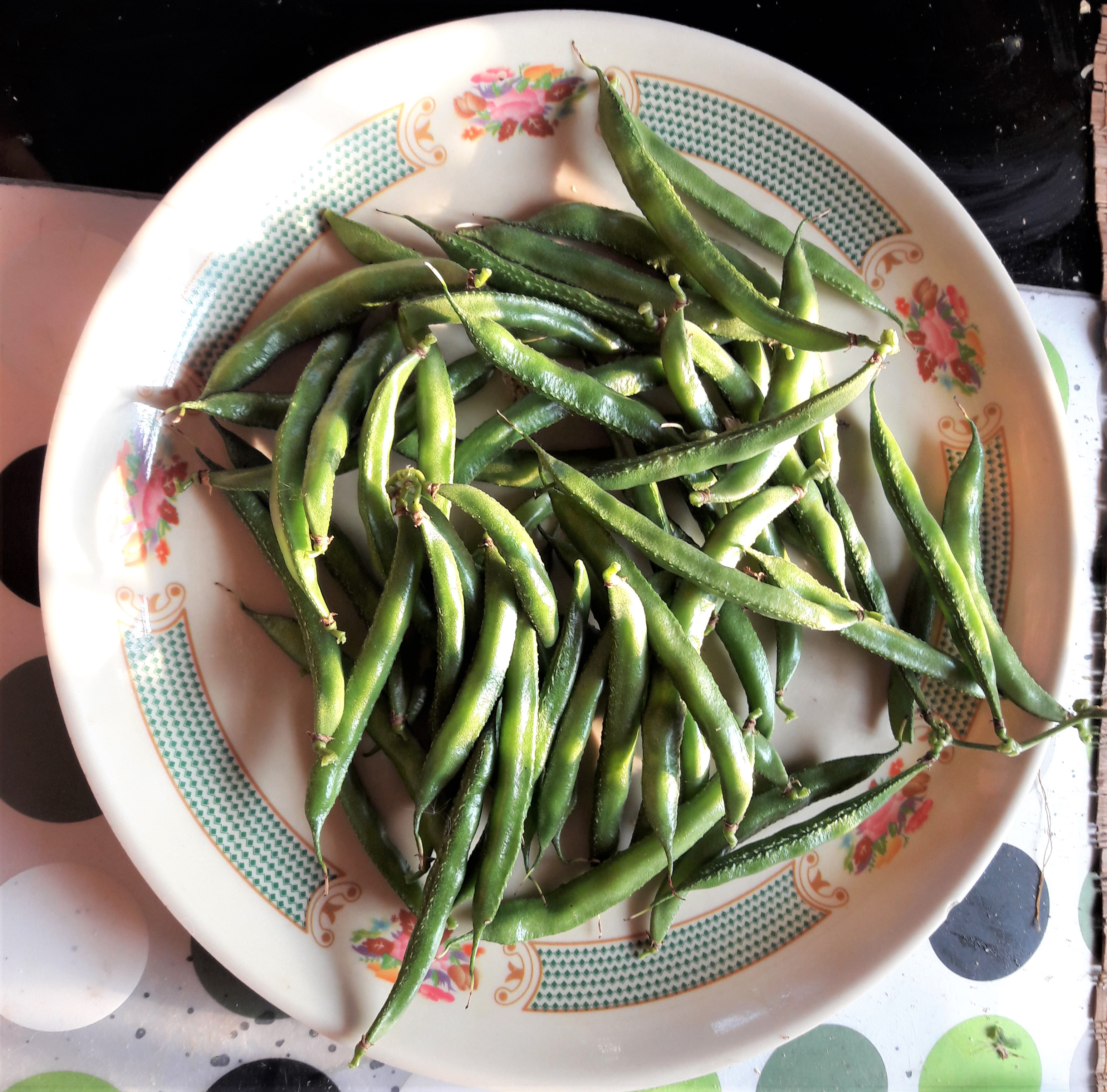 చిక్కుడు కాయలు